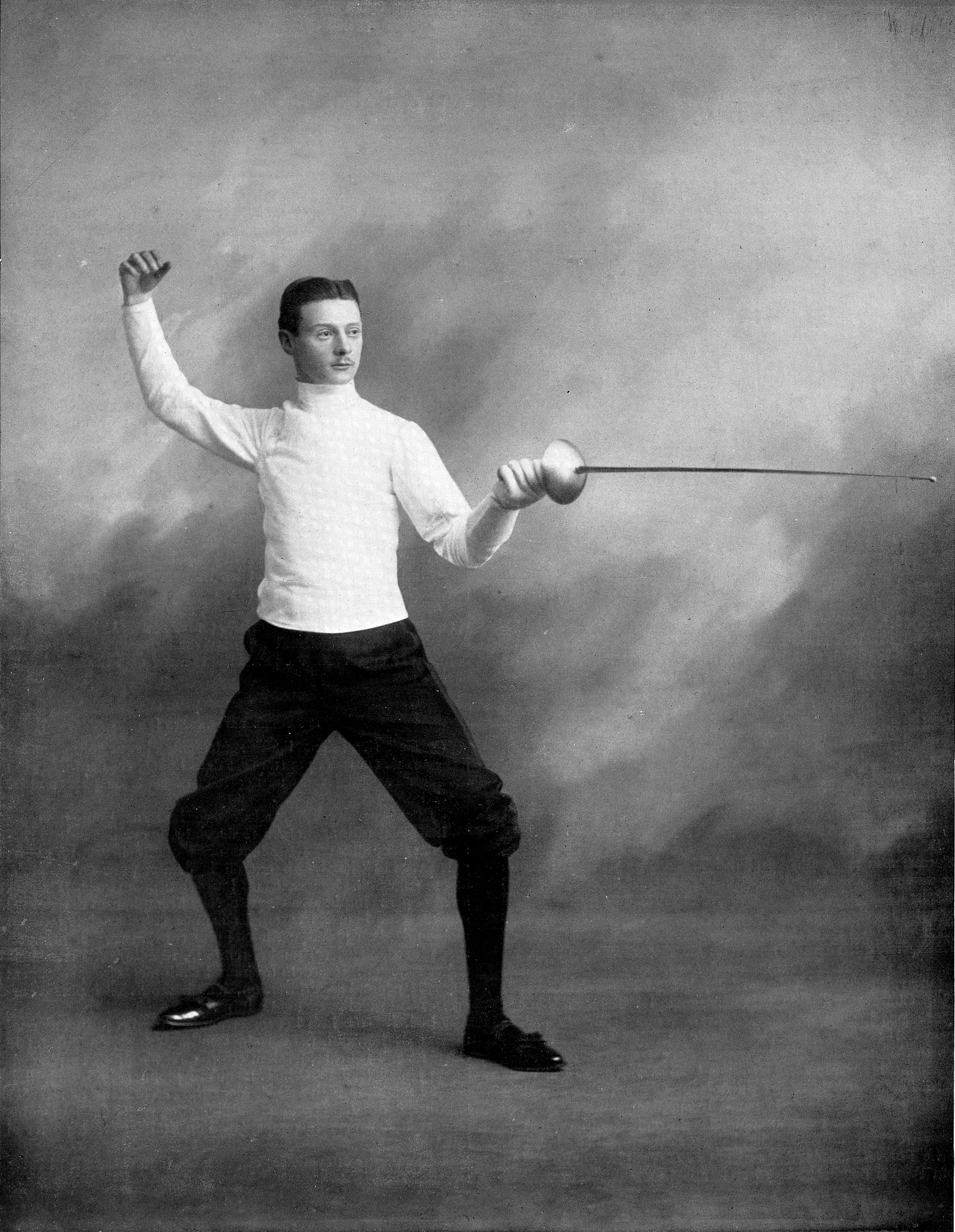 Lucien Gaudin, en janvier 1906.